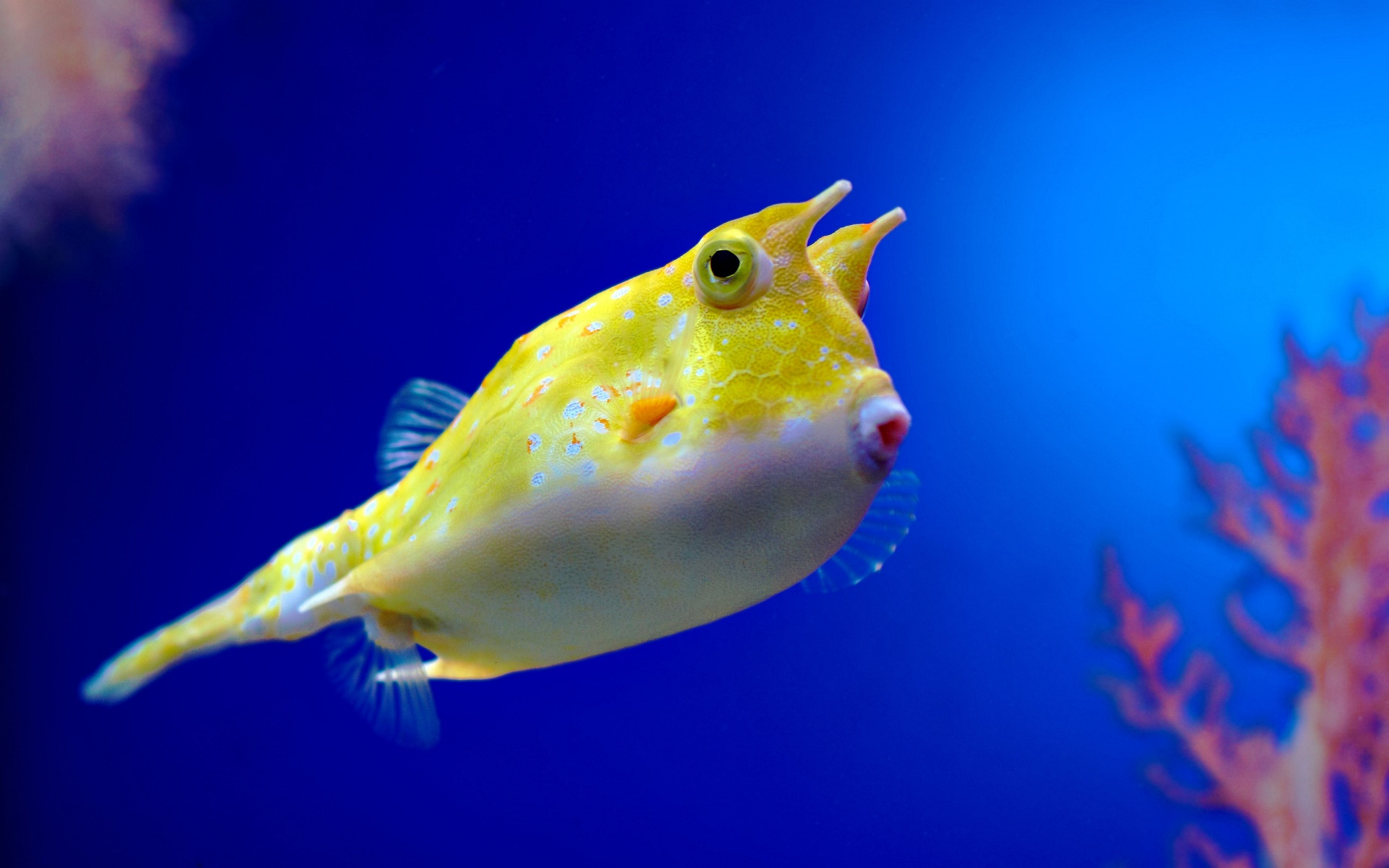 Lactoria cornuta